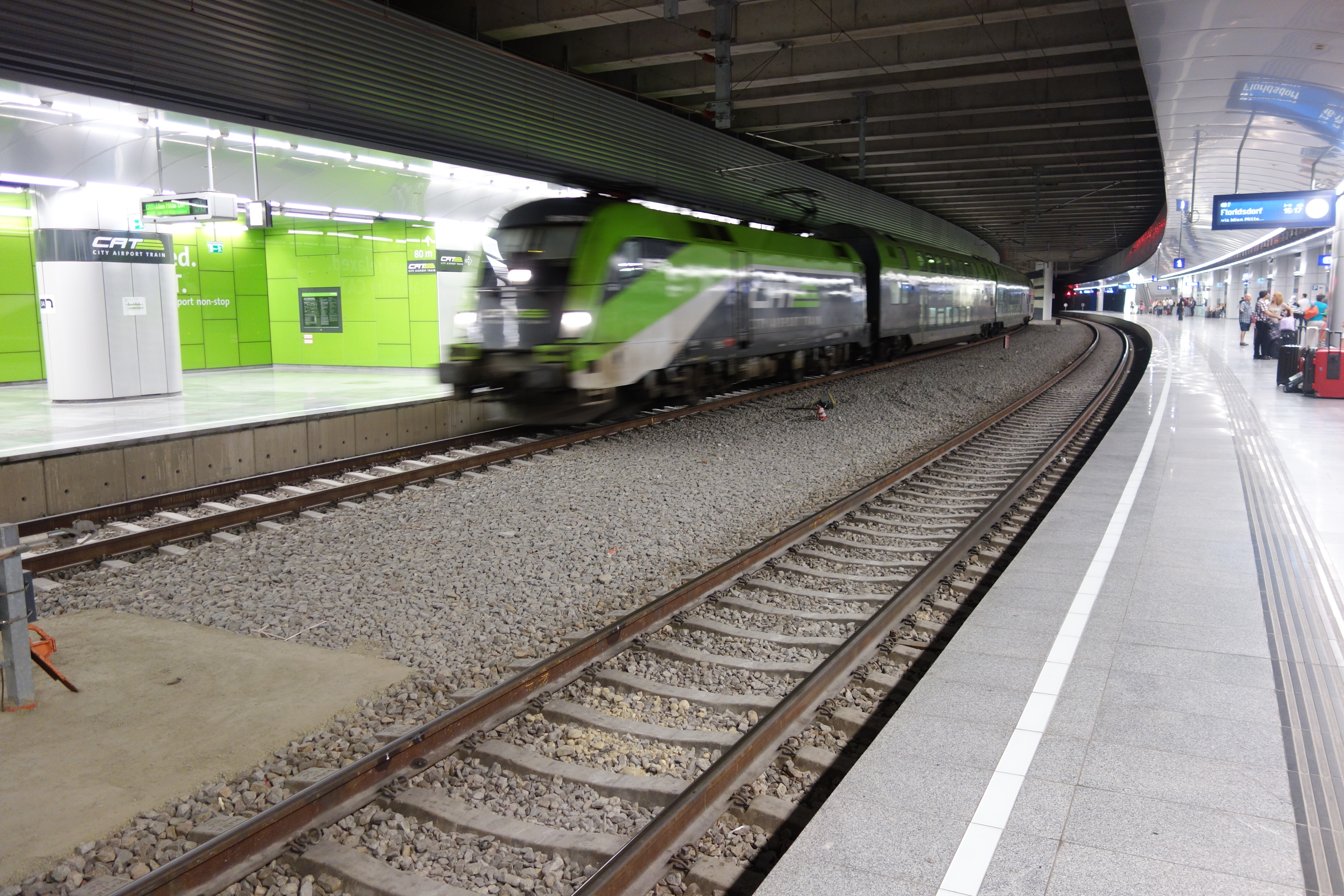 Eine Garnitur des City Airport Train (CAT) verlässt den Bahnhof Flughafen Wien. (Juli 2014)